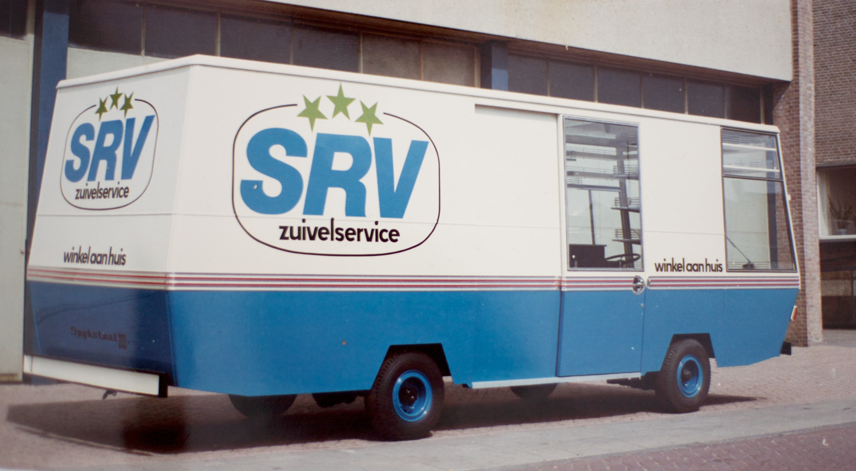 SRV-wagen. Foto: Sebastiaan ter Burg.